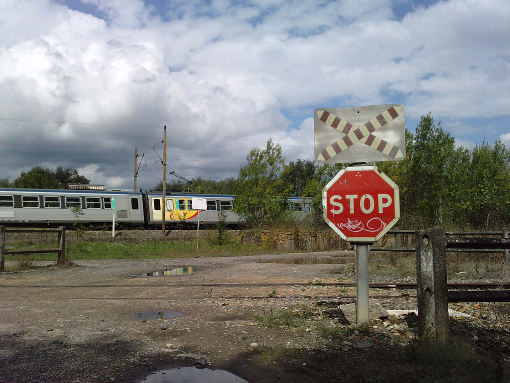 Vorn die inzwischen eingleisige Bahnstrecke Pont-Magis–Liouville, hinten nach Thionville in Champagne-Ardenne